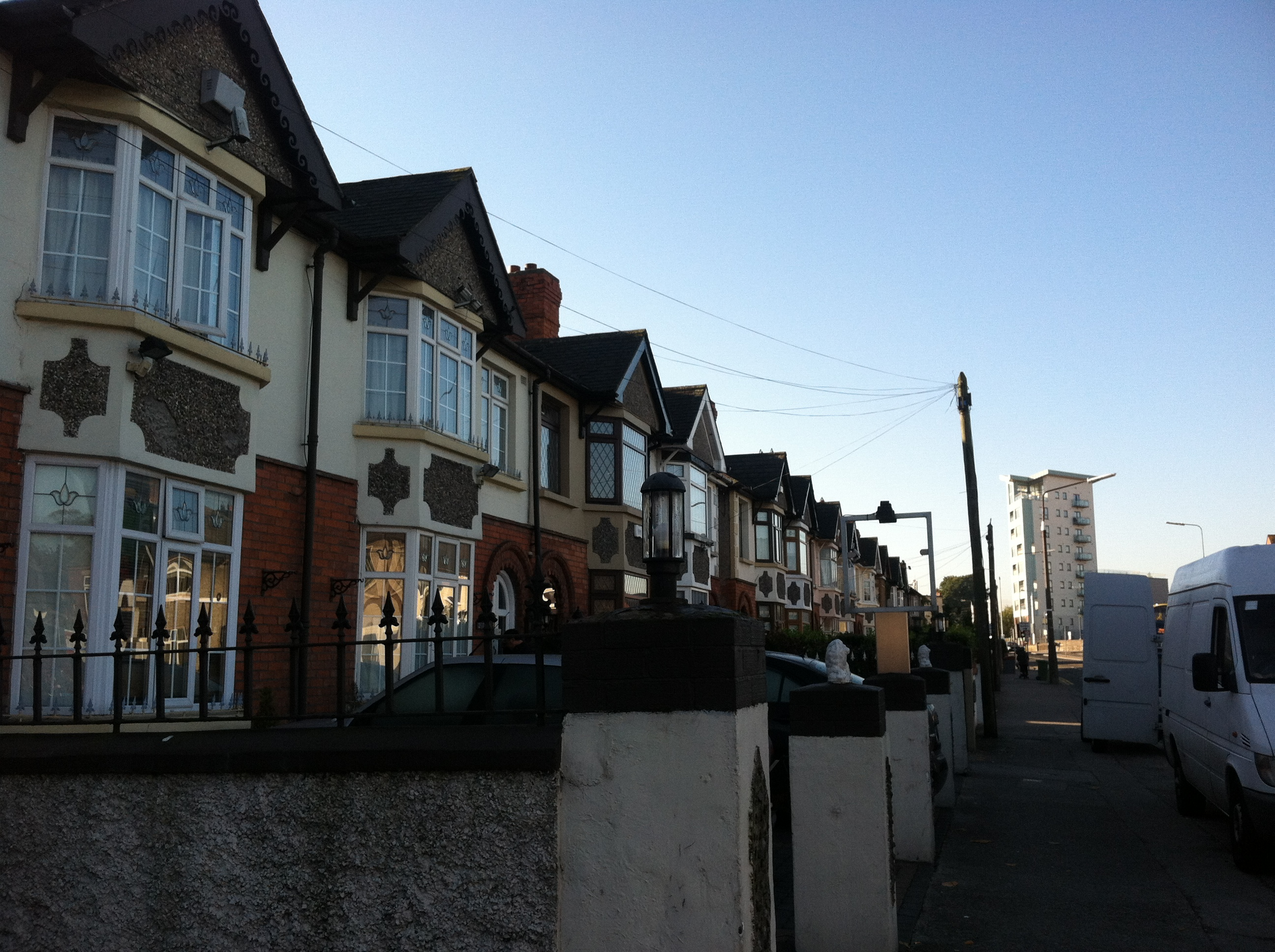 Black horse place, Inchicore Town, Dublin 8, Ireland. Eriana Torrealba